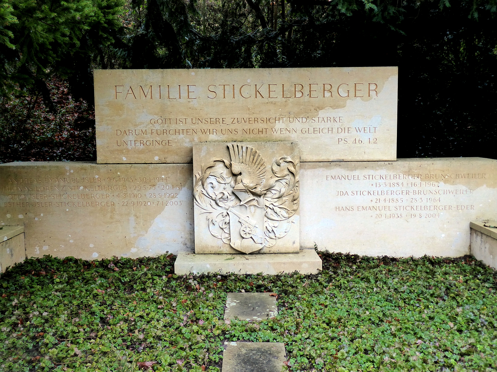 Emanuel Stickelberger-Brunschweiler (1884–1962), Unternehmer, Schriftsteller, Familiengrab auf dem Friedhof Hörnli, Riehen, Basel-Stadt